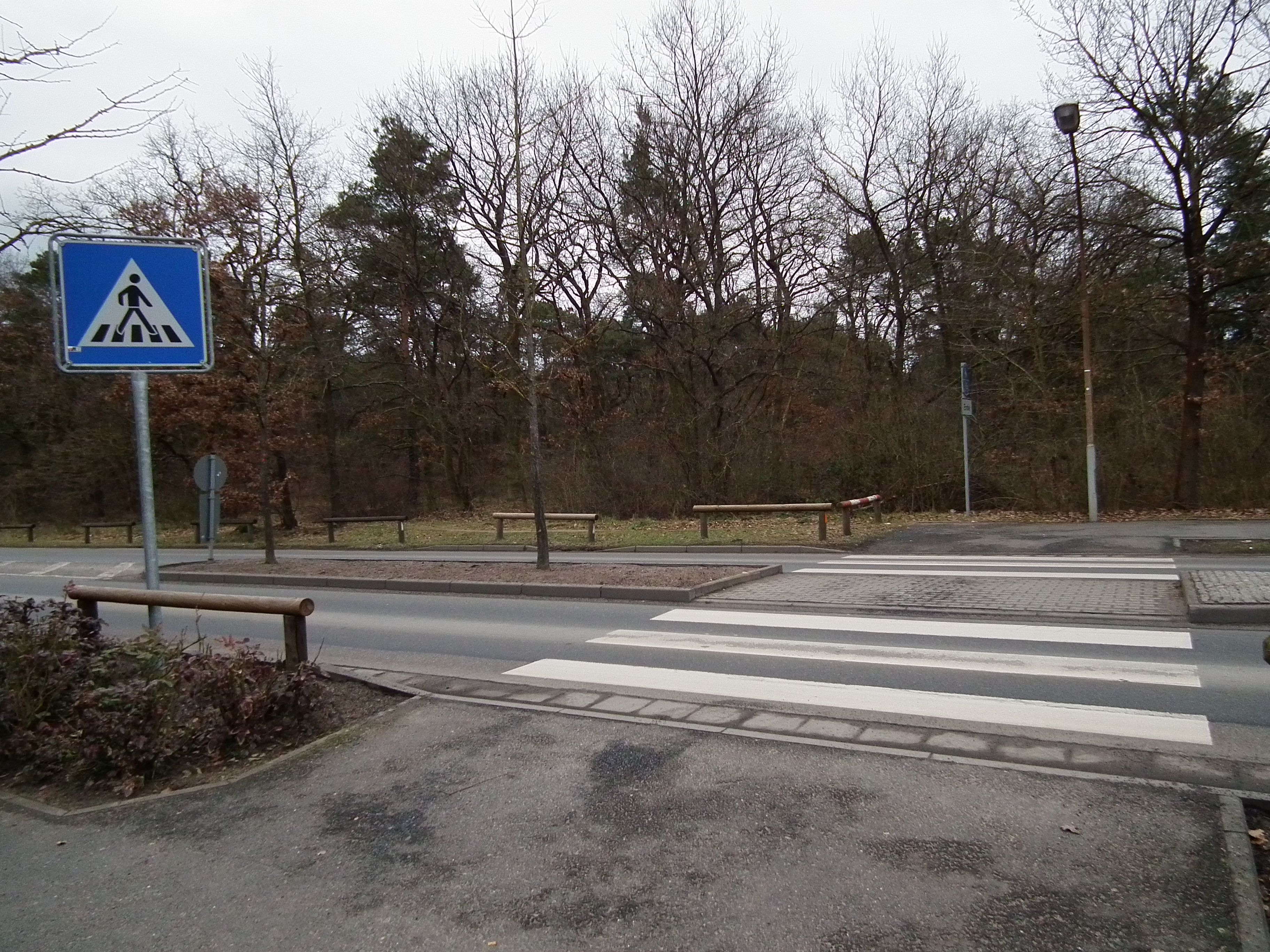 Zebrastreifen in Jügesheim (Hessen, Deutschland)